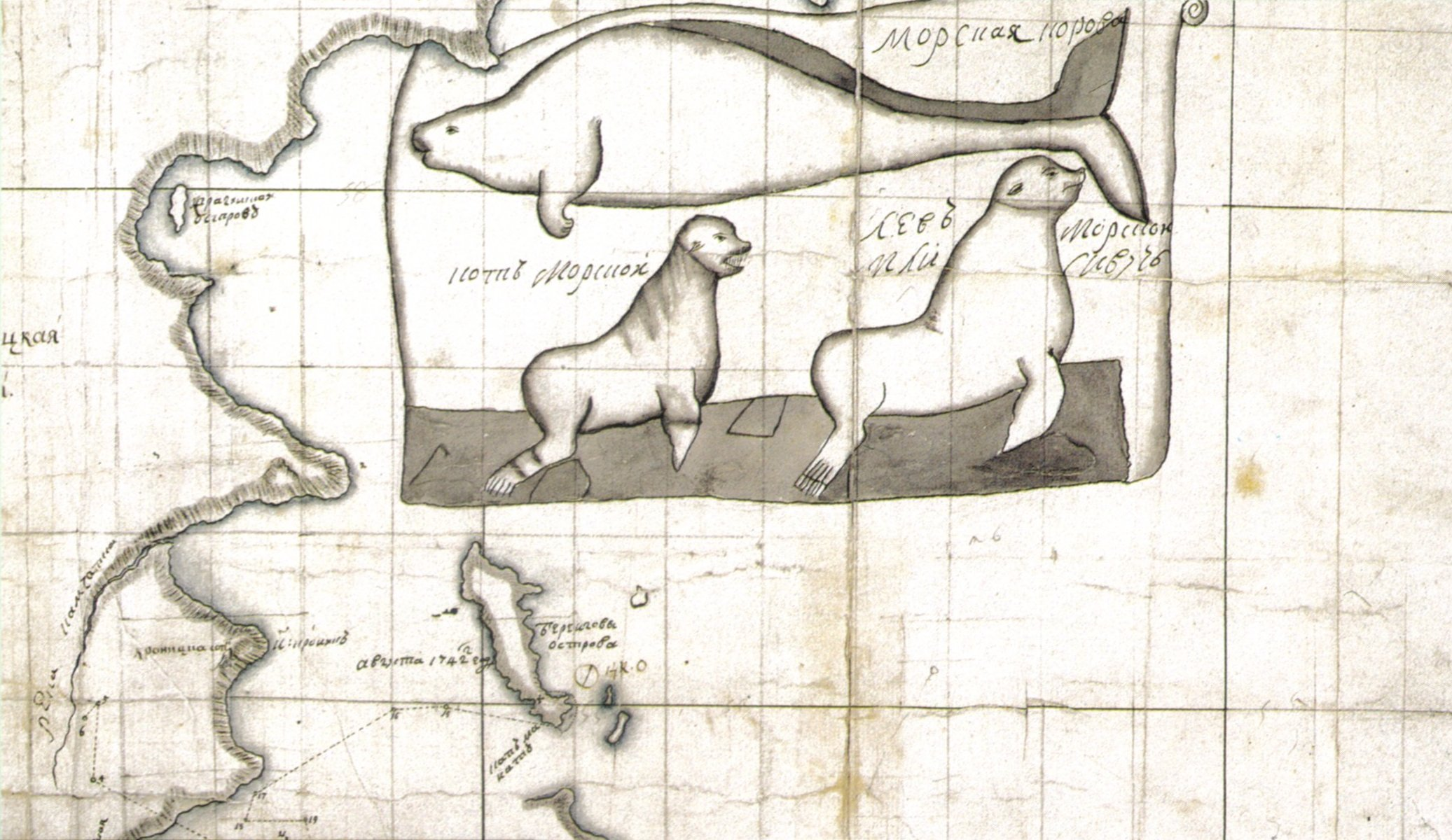 Stellersche Seekuh, Seebär und Seelöwe, Ausschnitt aus einer Karte von Sofron Chitrow, 1744 (Staatliches Marinearchiv St. Petersburg)